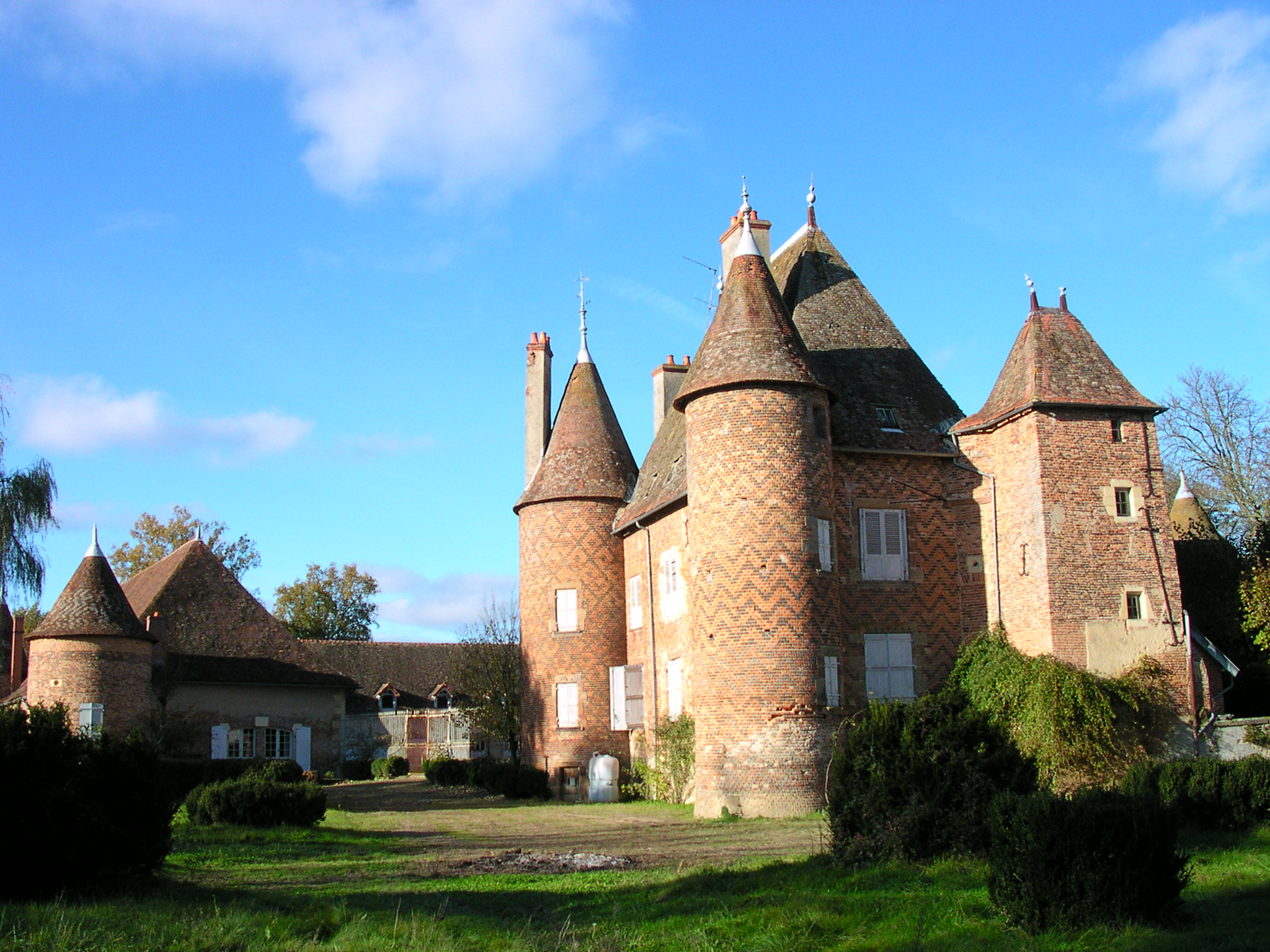 Le château de la Cour à Chapeau, Allier